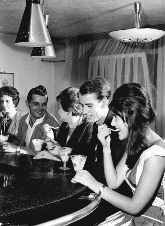 Gerichshain, Blick in die Milchbar Zentralbild Schaar Sta-Pr 26.9.1961 Die Kultur ins Dorf geholt haben sich die Einwohner von Gerichshain, Kreis Wurzen, mit dem Bau einer modernen, mit allem Komfort ausgestatteten Gaststätte. Der Schlager der neuen Gaststätte ist die Milchbar. Außerdem gibt es ein Gesellschaftszimmer, einen Saal mit Bühne, eine Bar, eine Bibliothek, eine Kegelbahn, ein Versammlungszimmer und eine Bauernstube, die so beschaffen ist, dass sich die Bauern darin auch einmal in Stiefeln und Arbeitskleidung aufhalten können. 300000 DM kostete der Umbau einer alten Kneipe in diese moderne Gaststätte. 80000 DM erarbeiteten die Gerichshainer im NAW. Buchstäblich das ganze Dorf half mit. Allen voran ging der Steinmetztechniker und Architekt aus Liebhaberei, Kurt Fischer, der die Entwürfe für die Innengestaltung anfertigte und den Bauablauf leitete. Er leistete insgesamt 2000 Aufbaustunden. UBz: Die Milchbar ist besonders in der warmen Jahreszeit ein Anziehungspunkt, aber auch in den Tanzpausen ist ein Eisbecher oder ein eisgekühltes Milchmixgetränk etwas Herrliches.